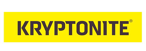 Galardón Dj Awards